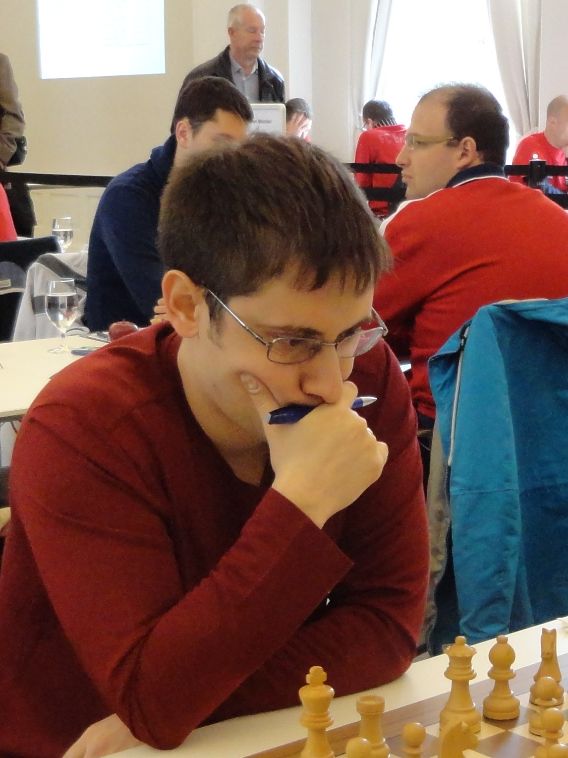 Dmitry Jakovenko, Deutsche Schachbundesliga Saison 2015/16, Runde 12 in Baden-Baden.